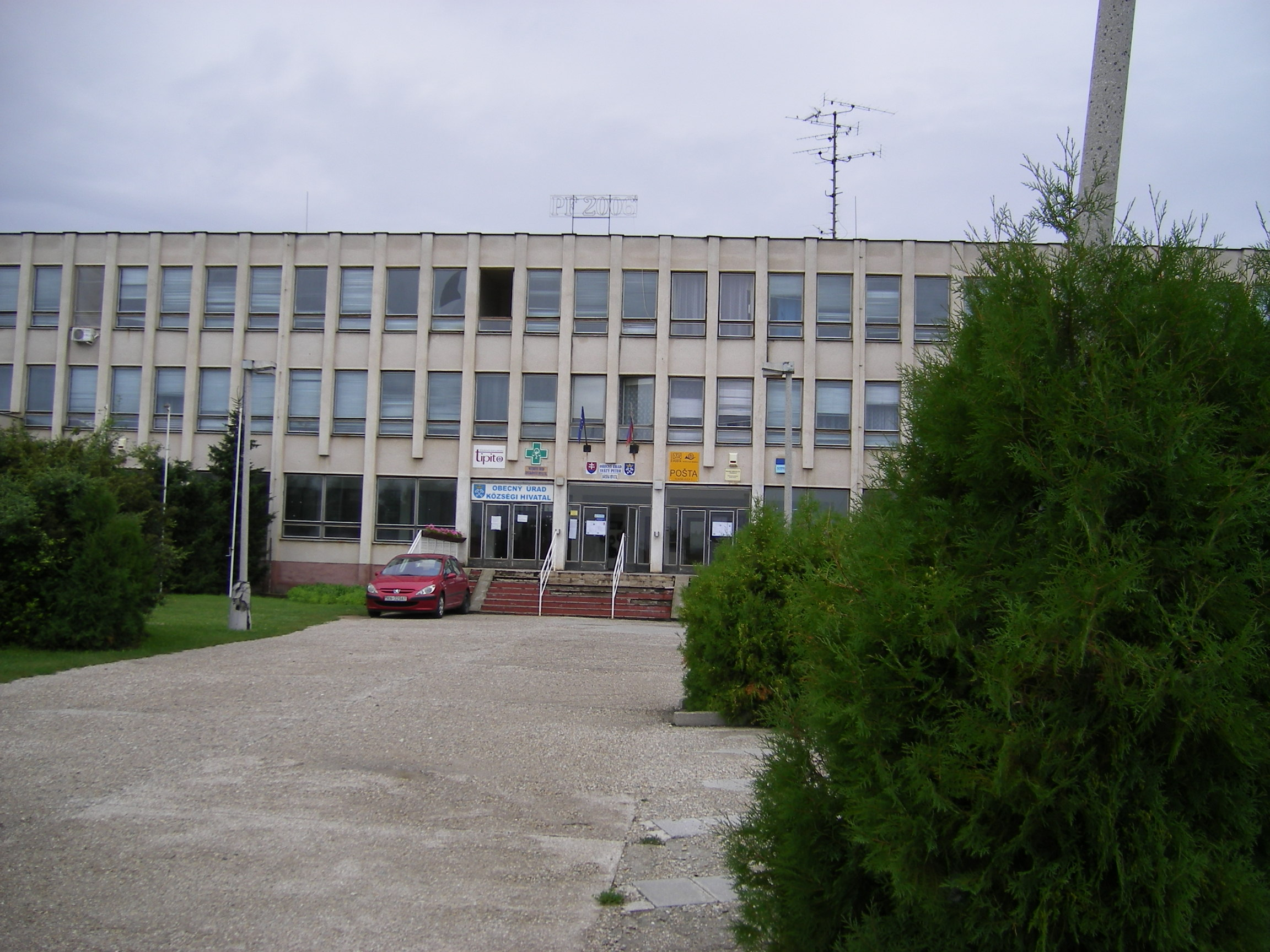 Svätý Peter (KN) municipal building